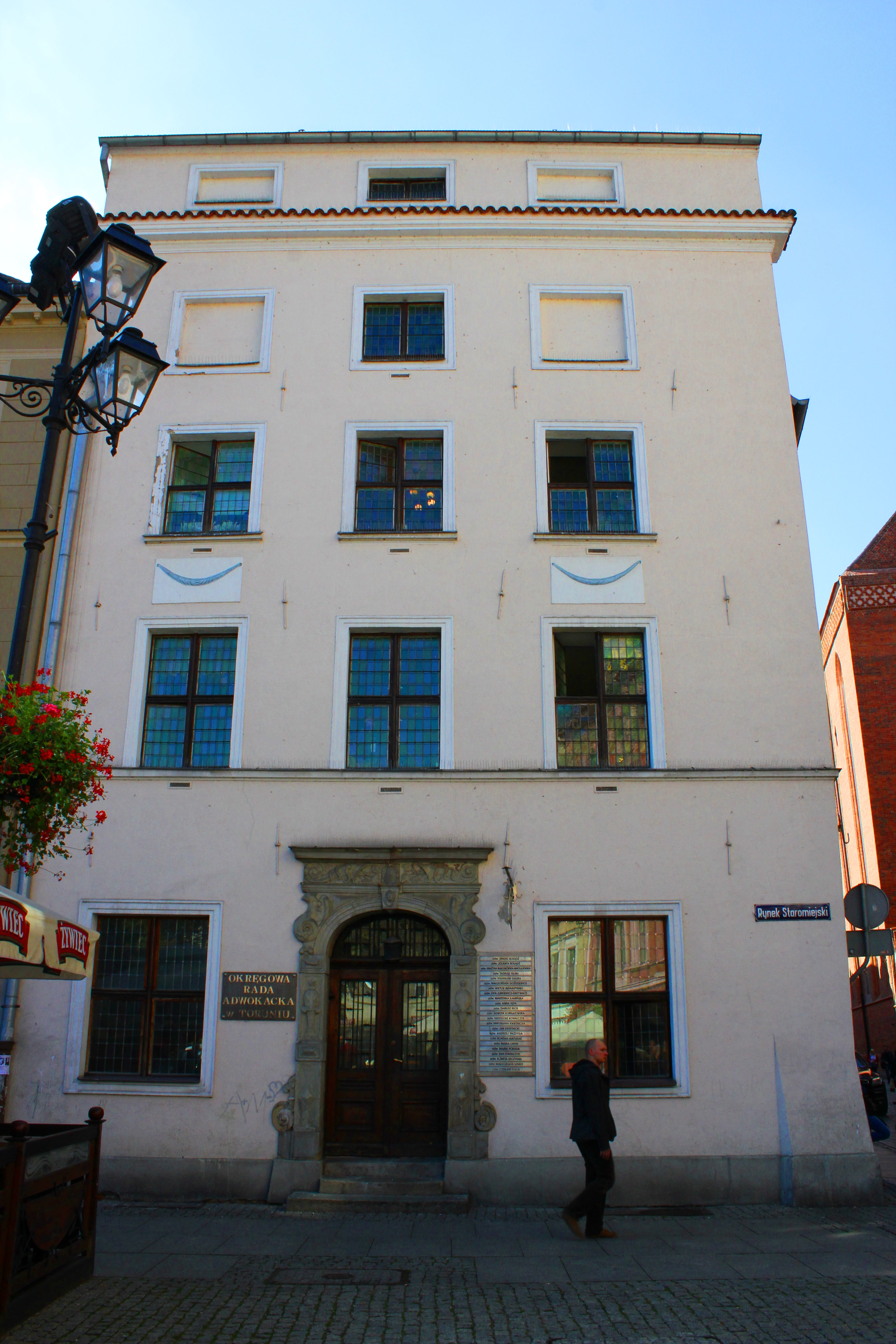 Toruń, Rynek Staromiejski 17 - dom, XV, 1703, XIX w. (zabytek nr A/77/210)